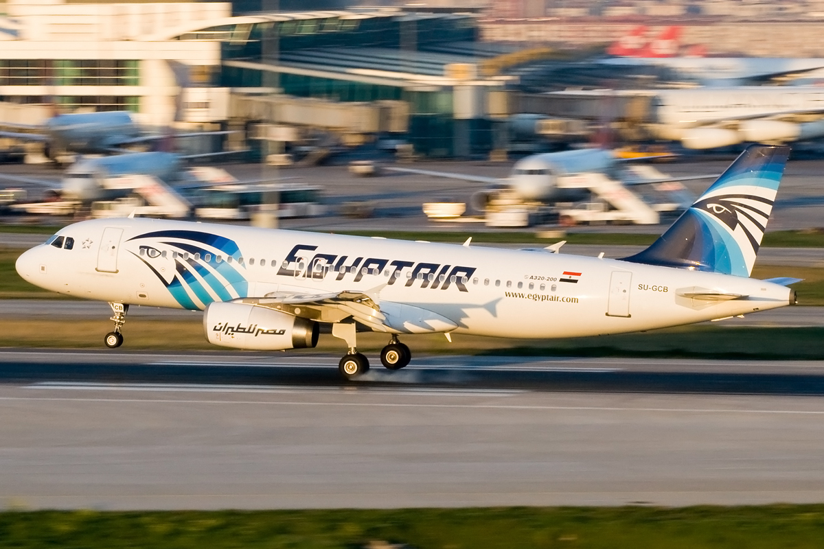 EgyptAir A320 SU-GCB